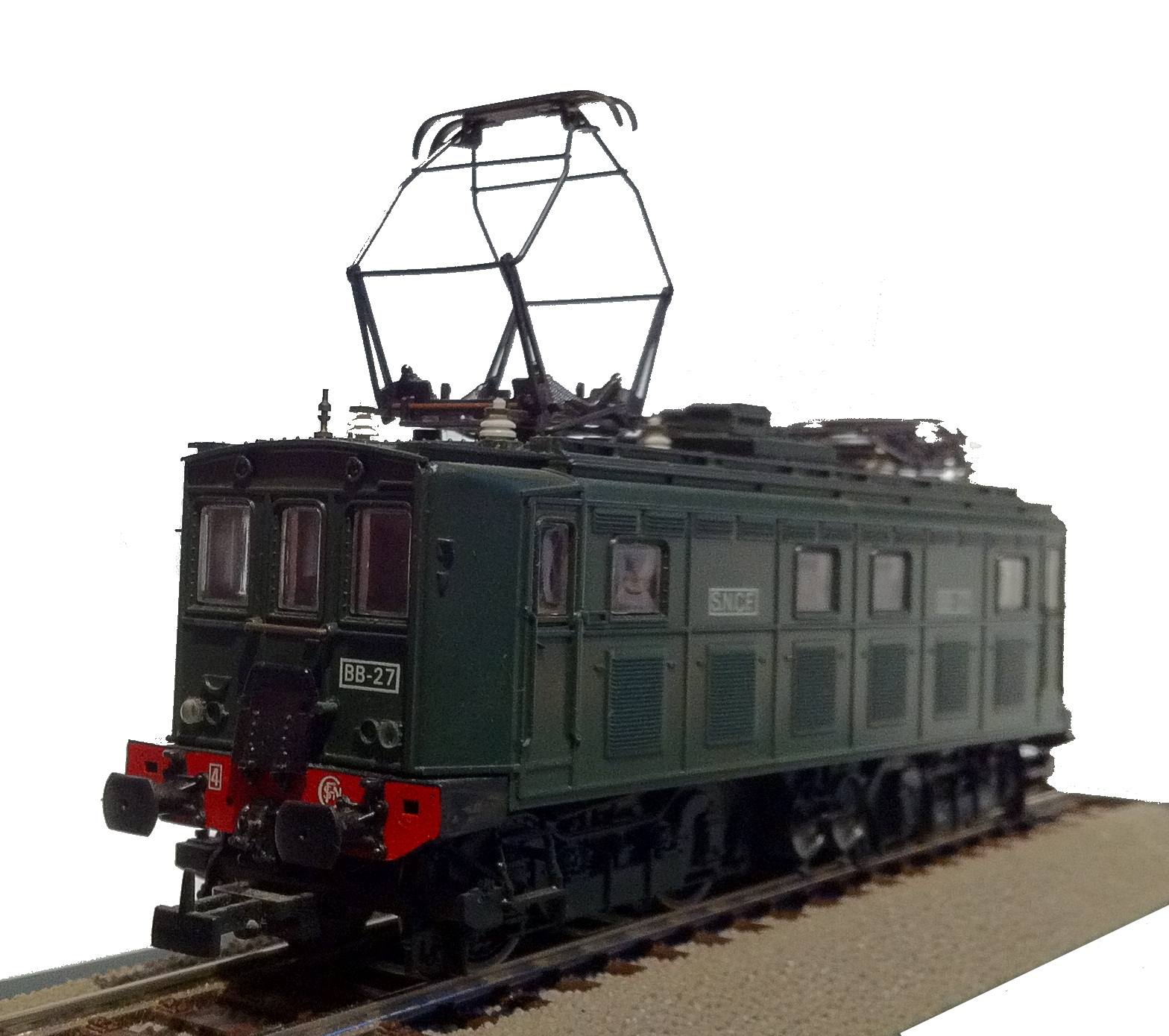 Biquette Jouef